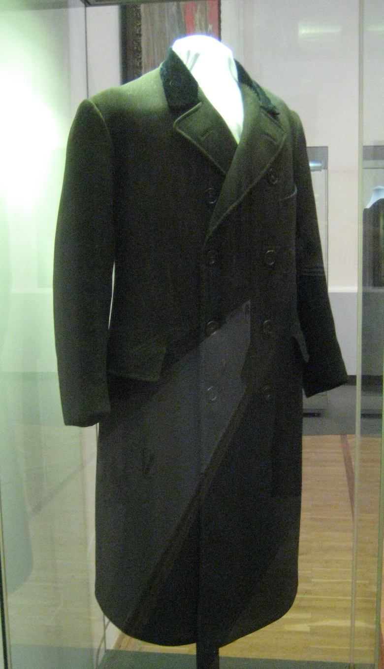 Пальто В.И. Ленина. 1910-е. Драп. ГИМ